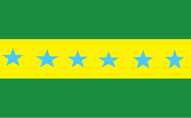 Bandera de Tiputini Cantón Aguarico Ecuador